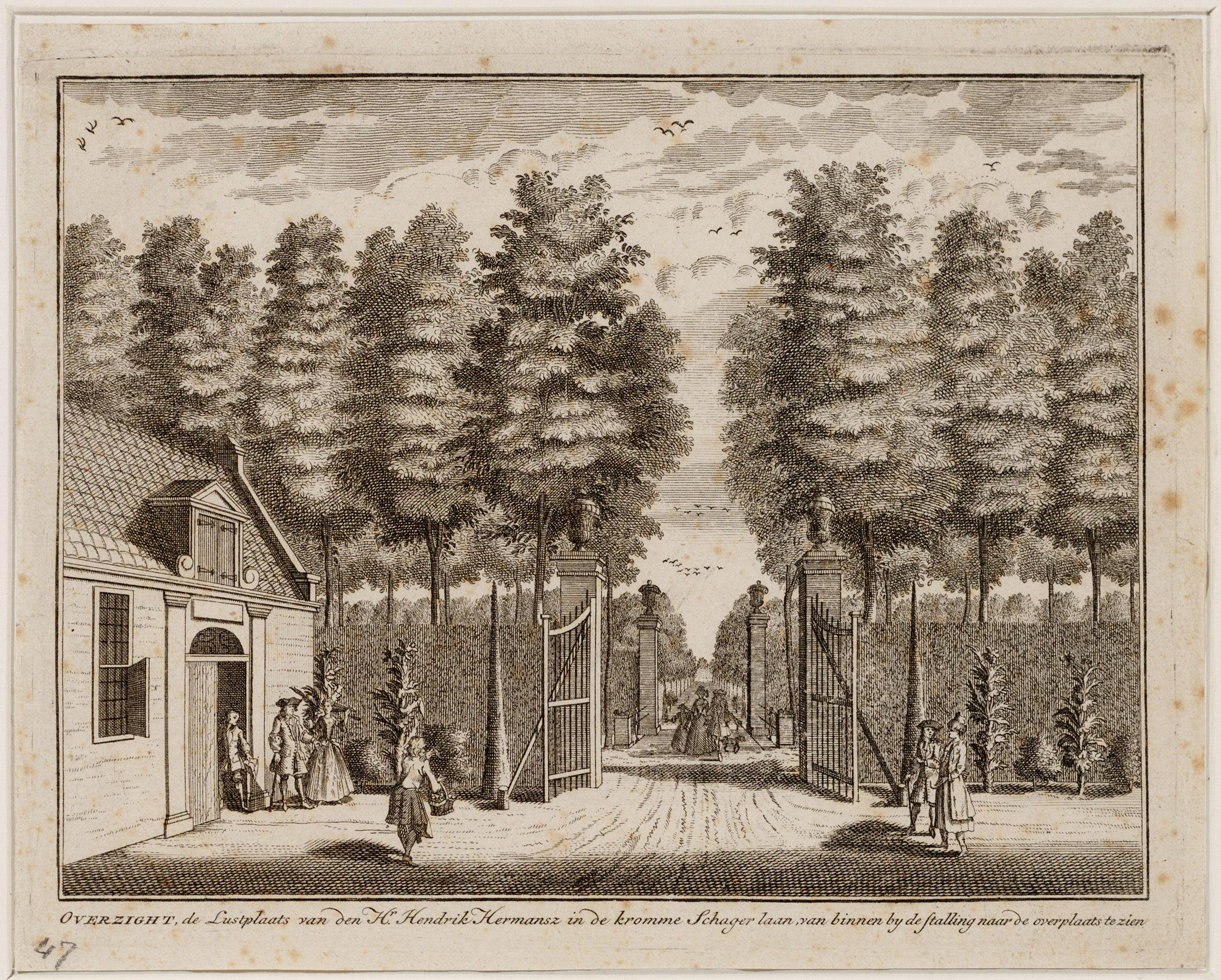 Beschrijving Overzight, de Lustplaats van den Hr. Hendrik Hermansz in de kromme Schagerlaan, van binnen bij de stalling naar de overplaats gezien De lustplaats Overzicht aan de Kromme Schagerlaan. Gezicht vanaf het voorterrein over de Schagerlaan naar de overtuin. Techniek: ets. Documenttype prent Vervaardiger Stopendaal, Daniël Greve, IJsack Collectie Collectie Stadsarchief Amsterdam: tekeningen en prenten Datering 1725 Geografische naam Schagerlaan Inventarissen Afbeeldingsbestand 010097004808